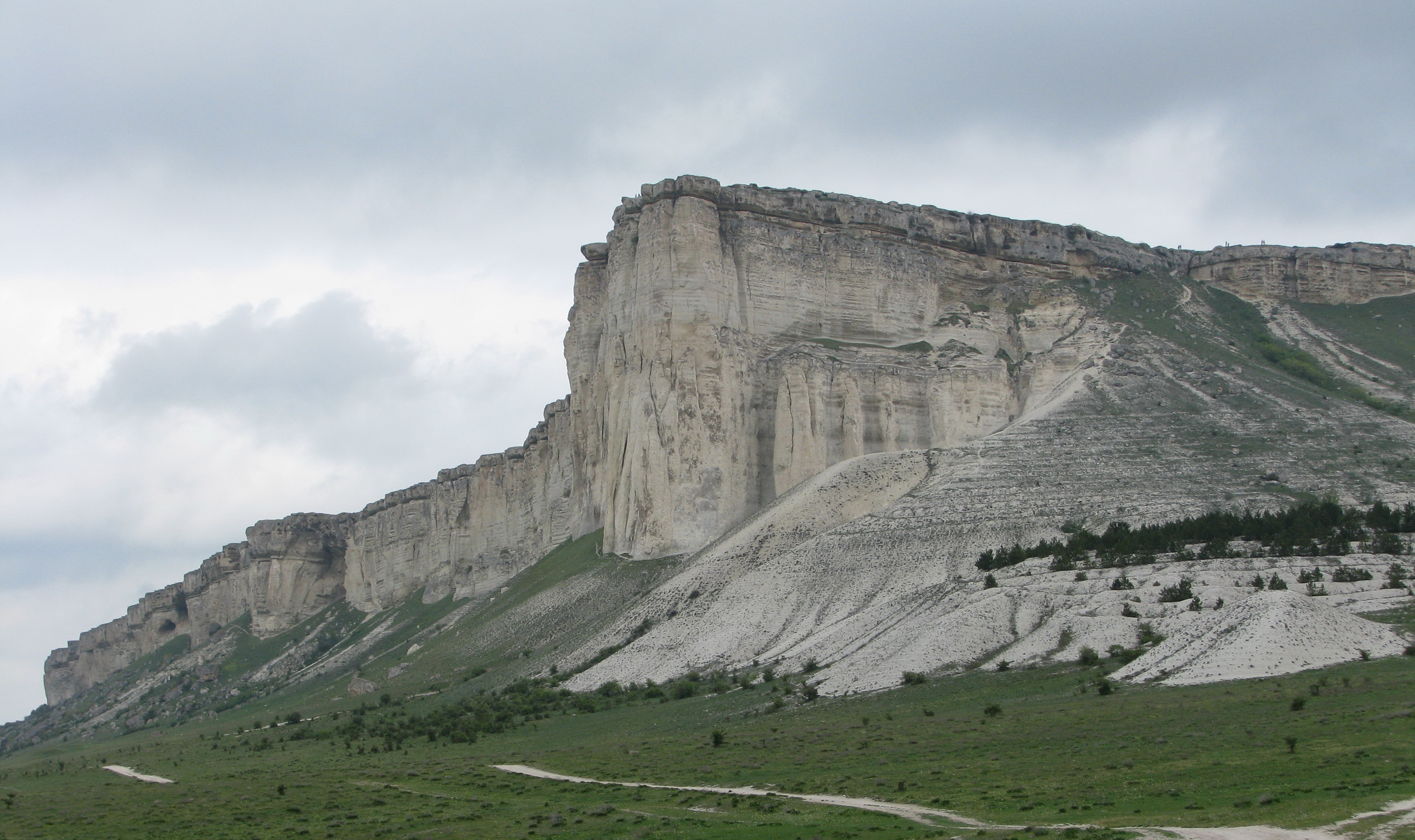 Белая скала (Ак-Кая), Крым